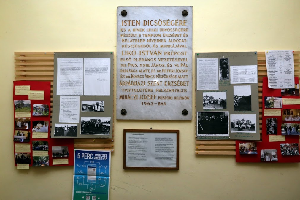 Budapest Pestszentlőrinc-Erzsébettelepi Szent Erzsébet templom, előtéri hirdetőtábla